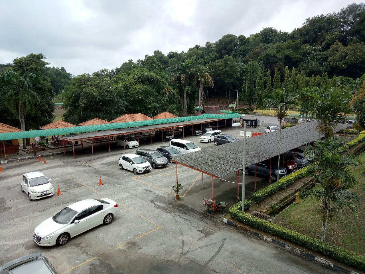 Tempat Letak Kereta tahun 2017